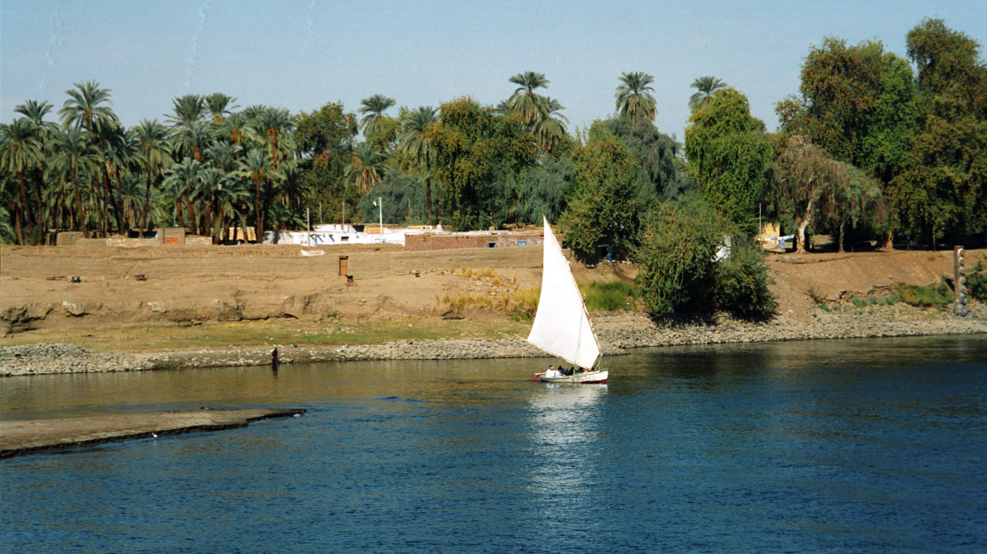 Nile